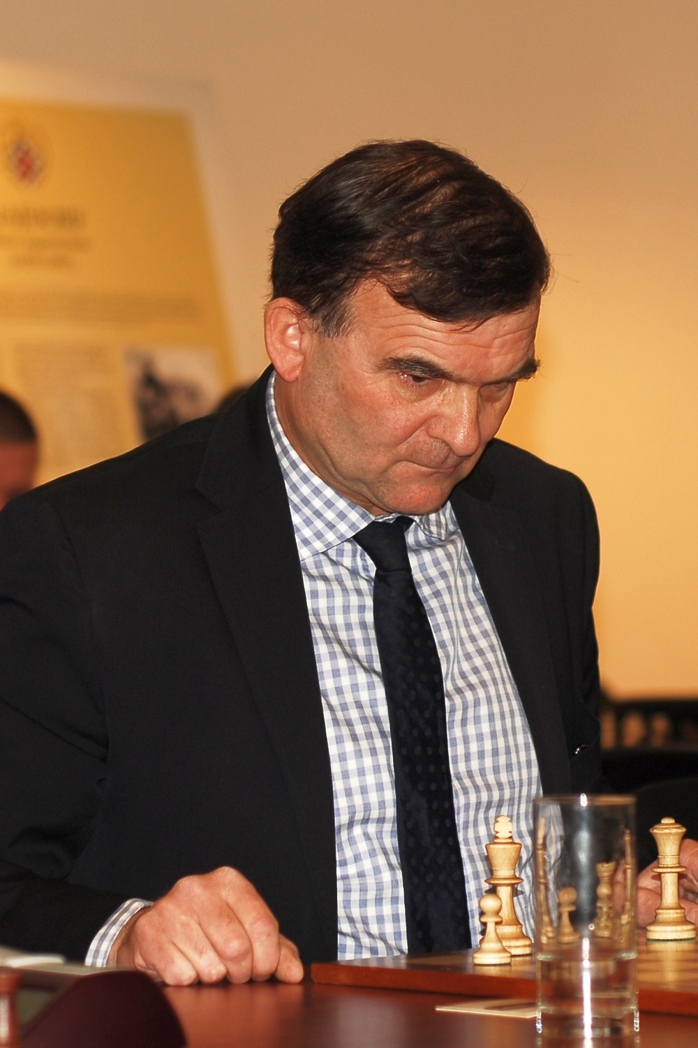 Tadeusz Wolsza podczas I Ogólnopolskiego Turnieju Szachowego o Puchar Prezesa Instytutu Pamięci Narodowej, Warszawa 16-17.04.2013.